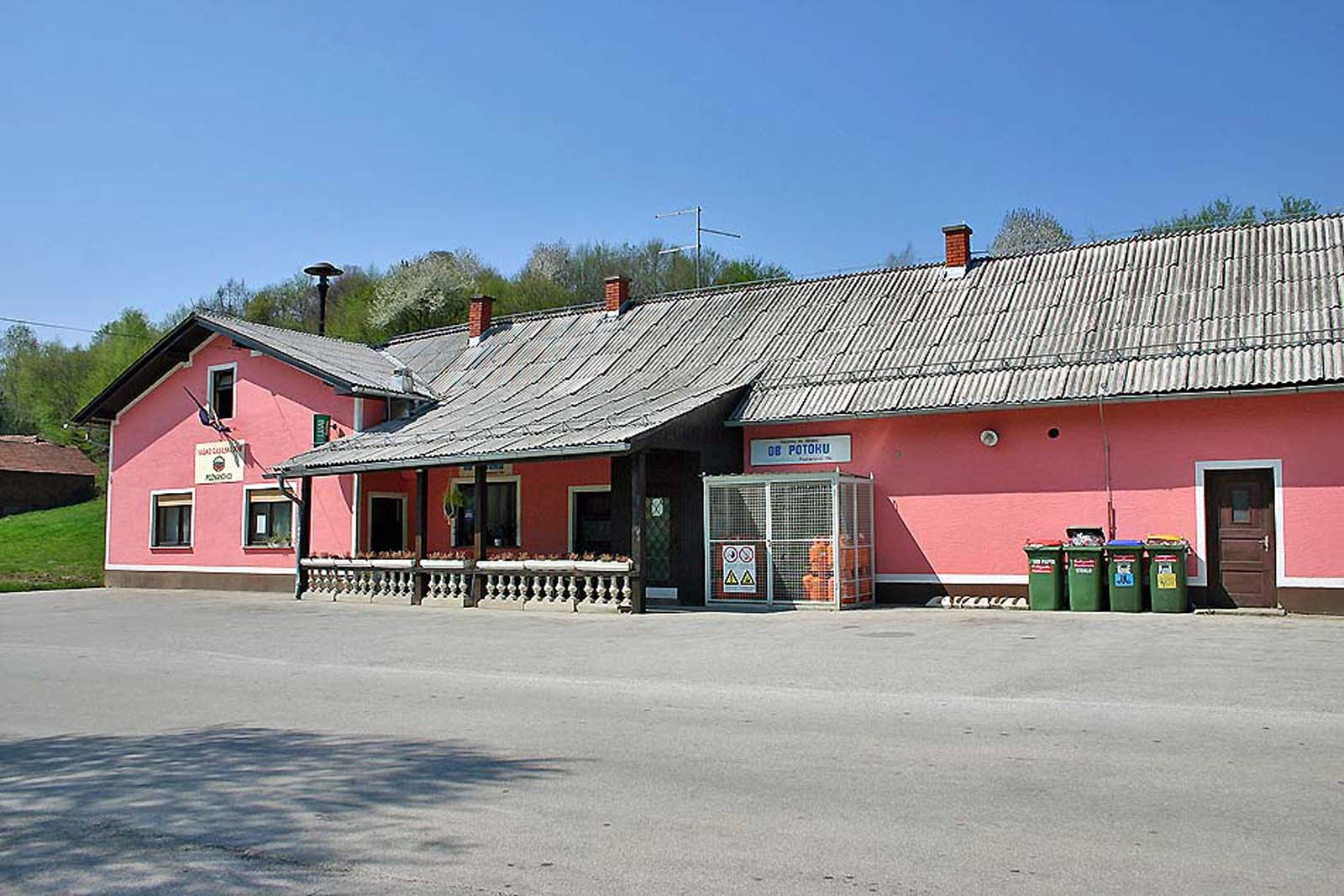 Prostovoljno gasilsko društvo Poznanovci. Volunteer fire Poznanovci. Freiwillige Feuerwehr Poznanovci.